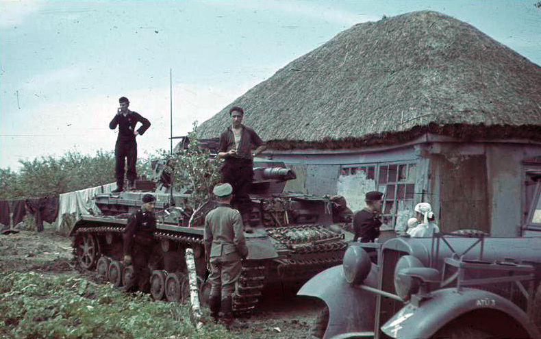 In der Steppe vor Stalingrad September 1942